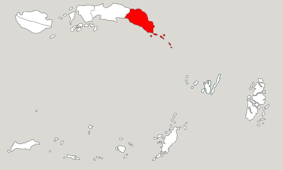 Округ Східний Серам-Багіан